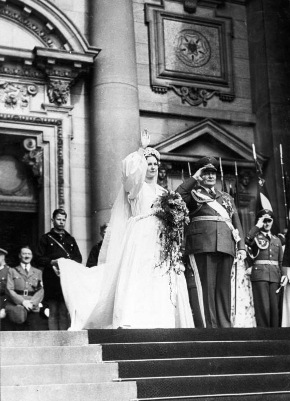 1935 Hermann Göring beim Verlassen des Berliner Domes nach der Trauung